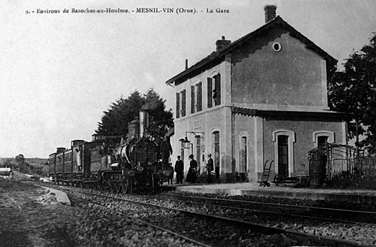 L'intérieur de la gare de Mesnil-Vin vers 1900. Le bâtiment voyageurs et en arrière plan, à gauche, la hall à marchandises.